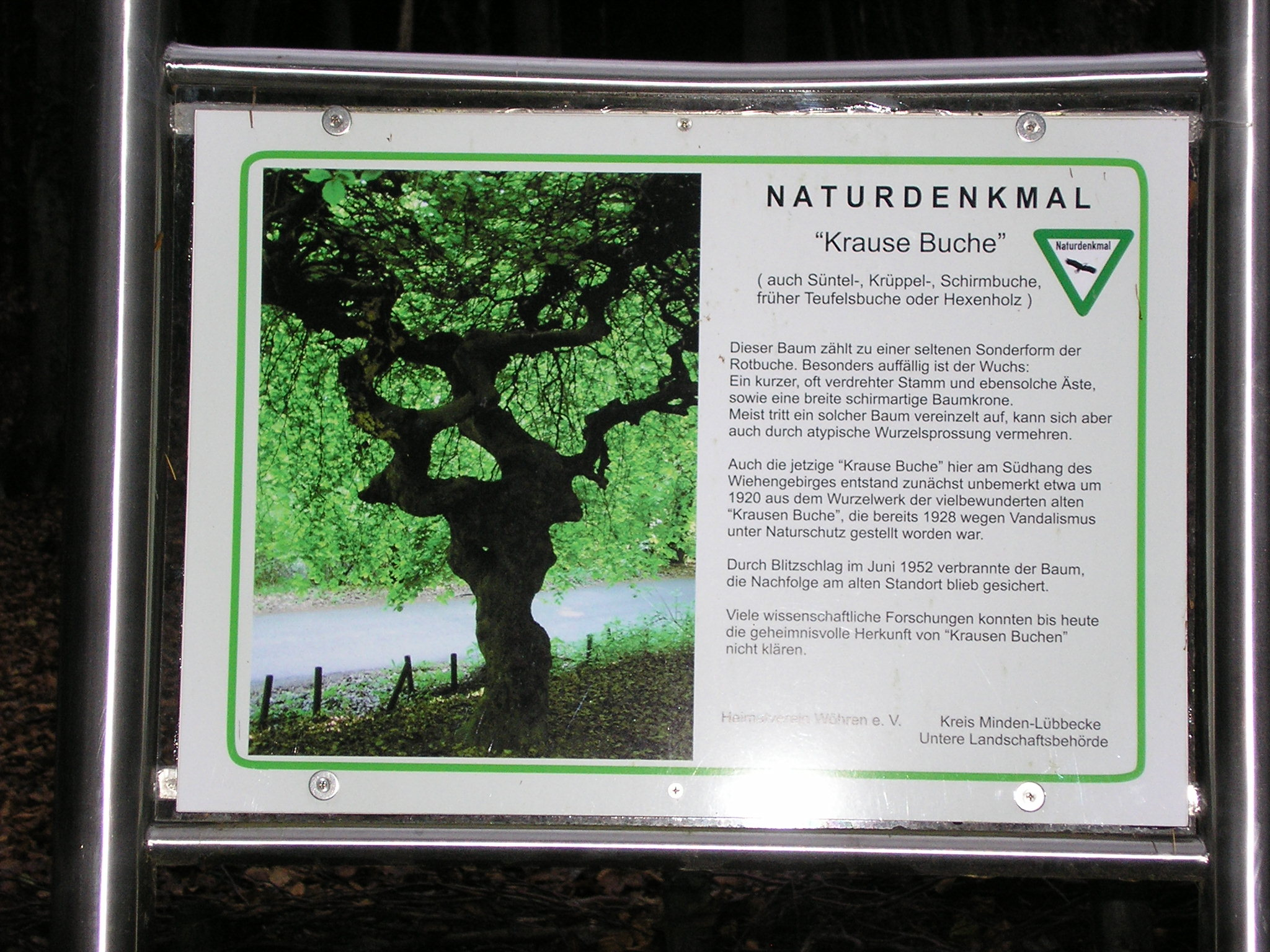 Hinweistafel an der Krausen Buche